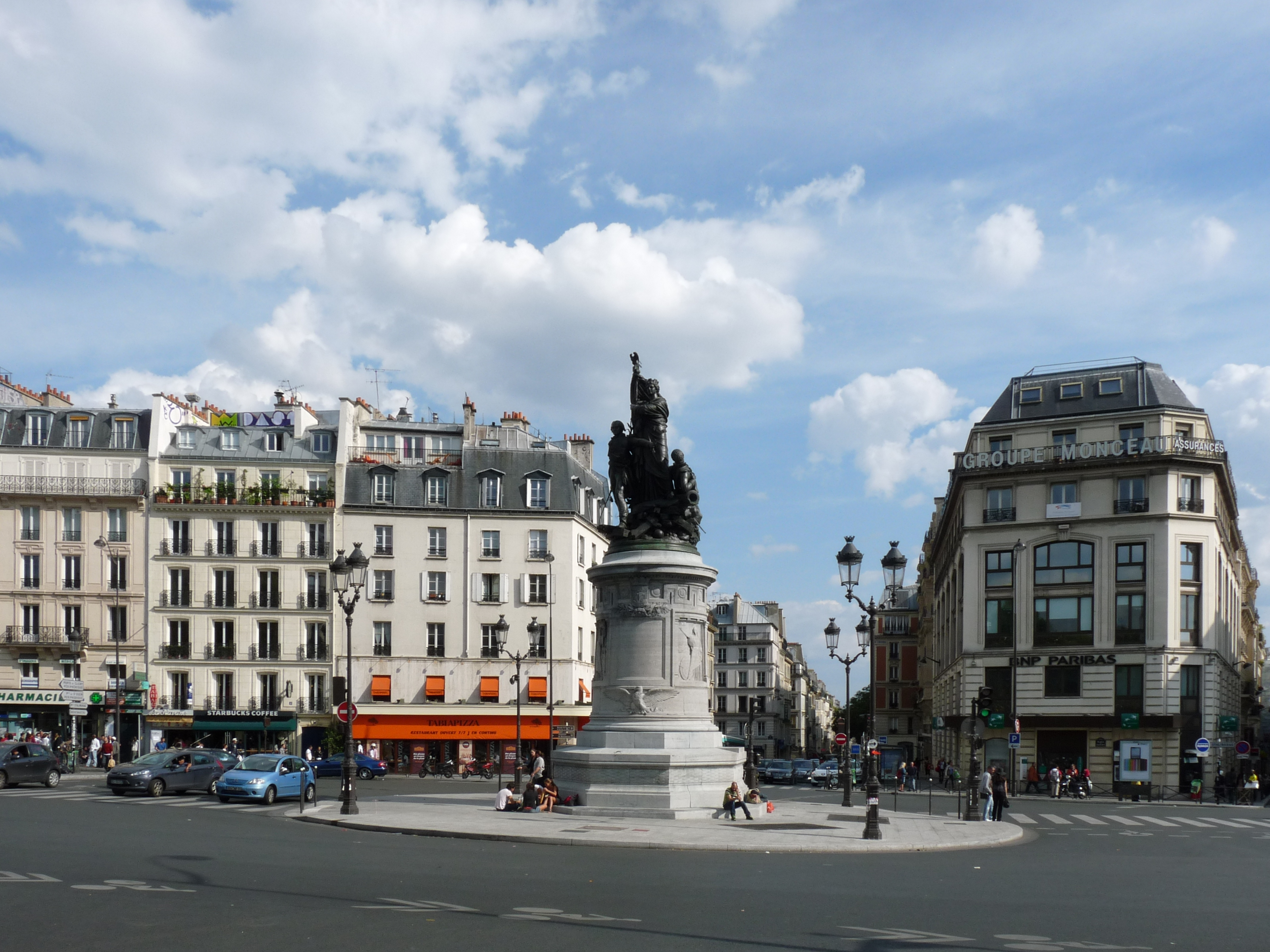 La place de Clichy à Paris, vue depuis son côté nord. En face la rue de Clichy.